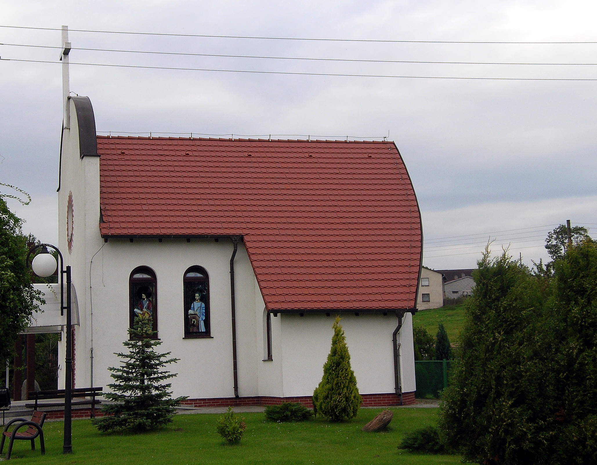 Kościół pw. św. Krzysztofa we wsi Balcarzowice